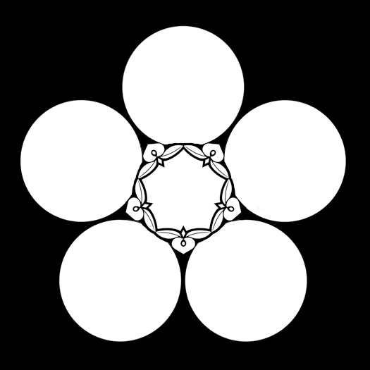 「五つ藤重ね星梅鉢」紋（染抜）